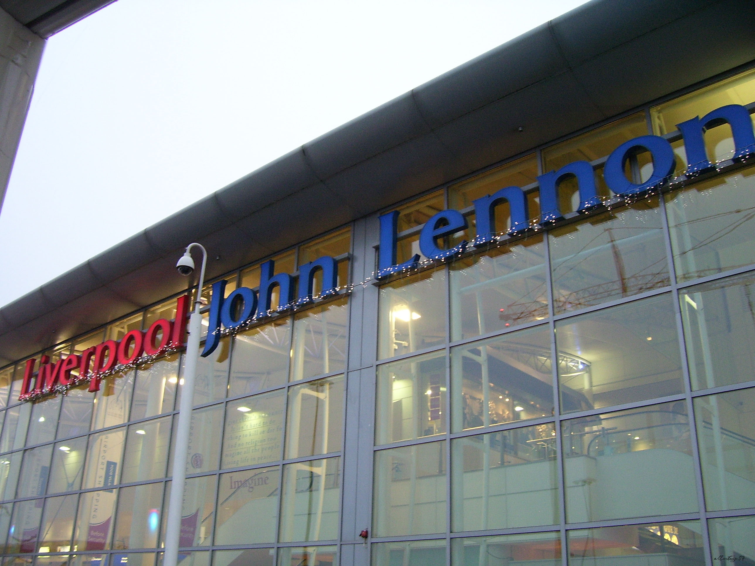 john lennon airport , liverpool